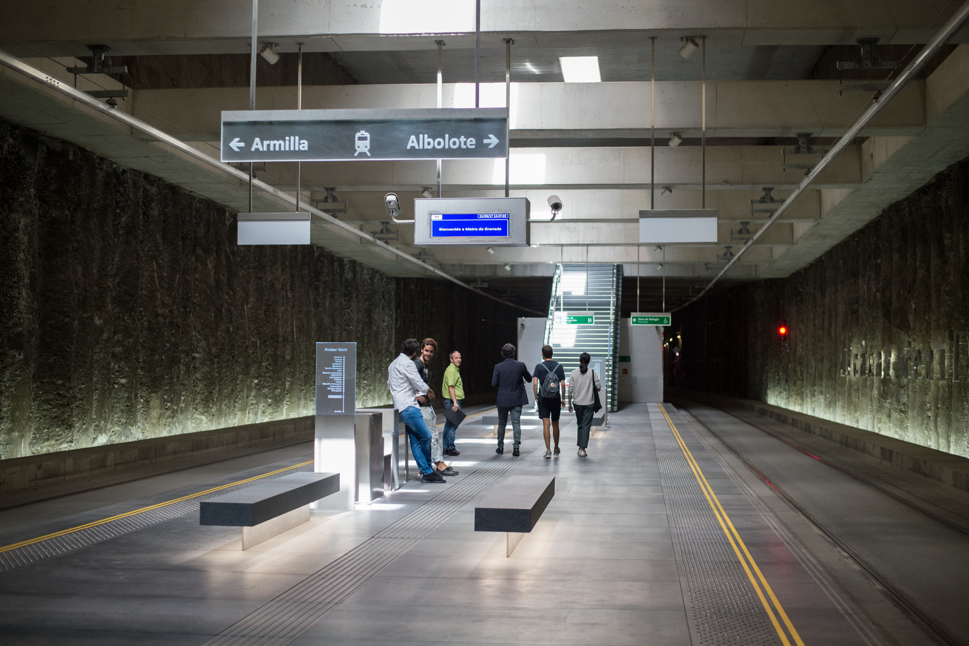 Andenes de Alcázar Gentil - Metro de Granada